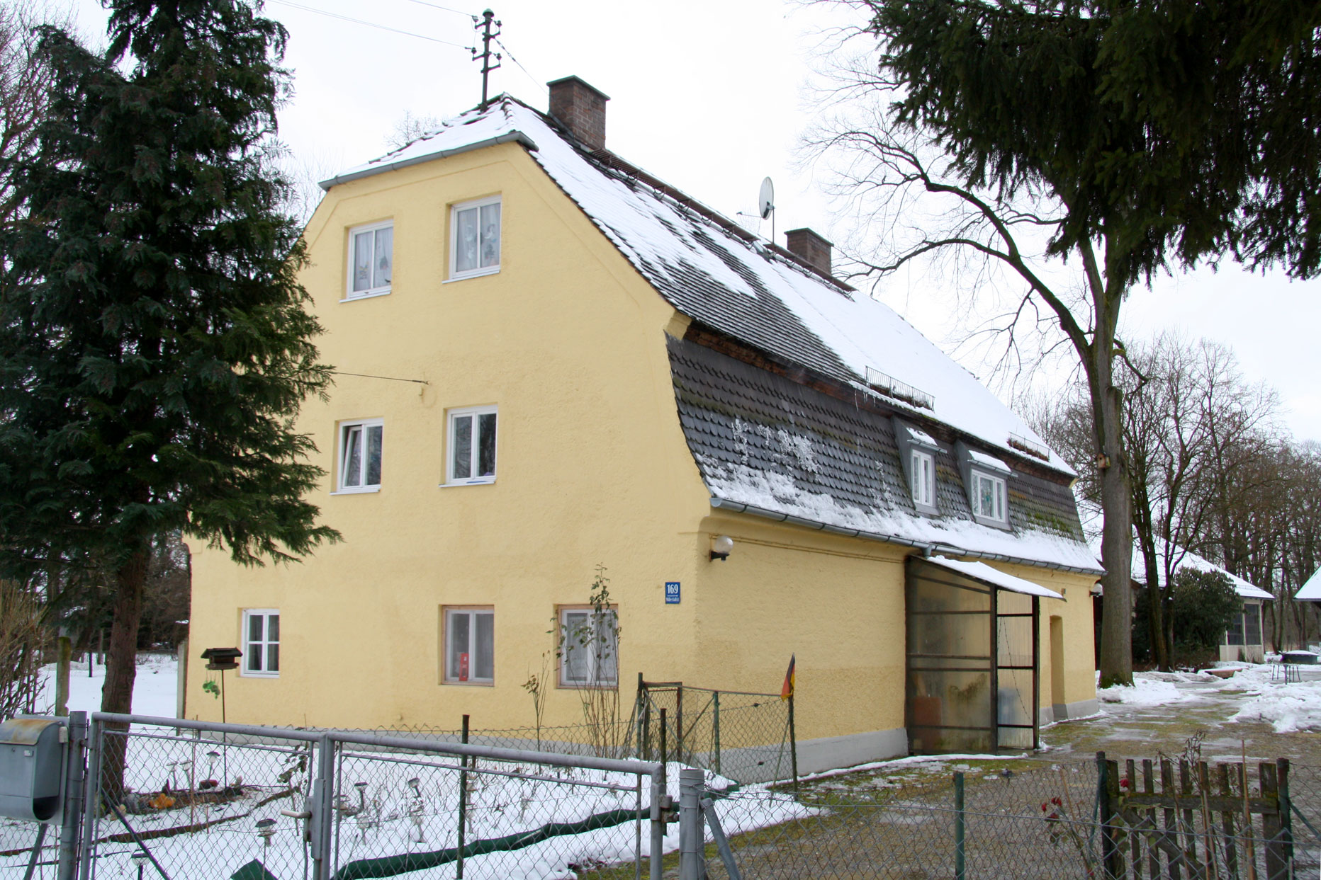 Wohnhaus in der Müllerstadelstraße 169 in Langwied, München, 1907 von Richard Riemerschmid erbaut